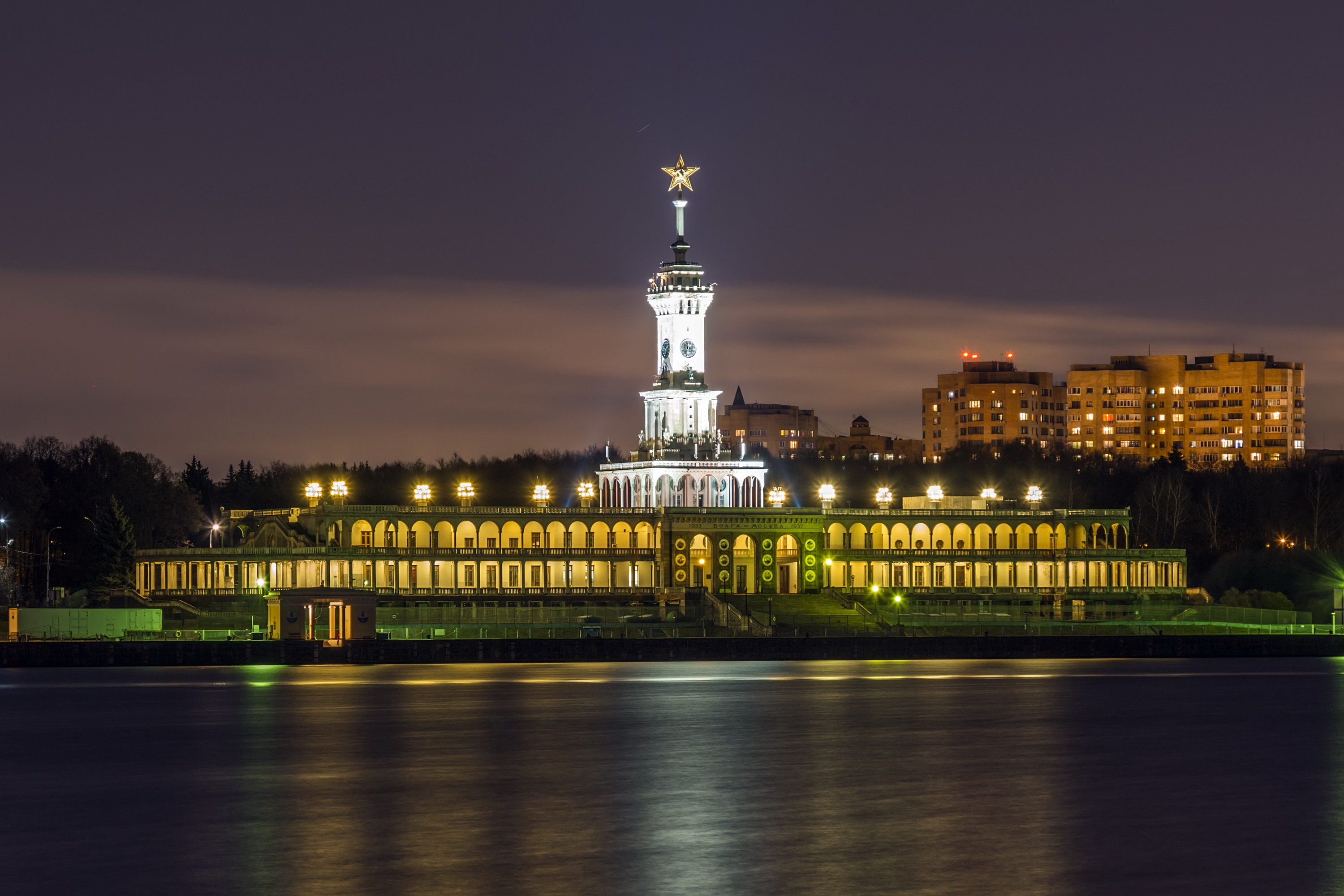 Московский северный речной вокзал. Ночь.